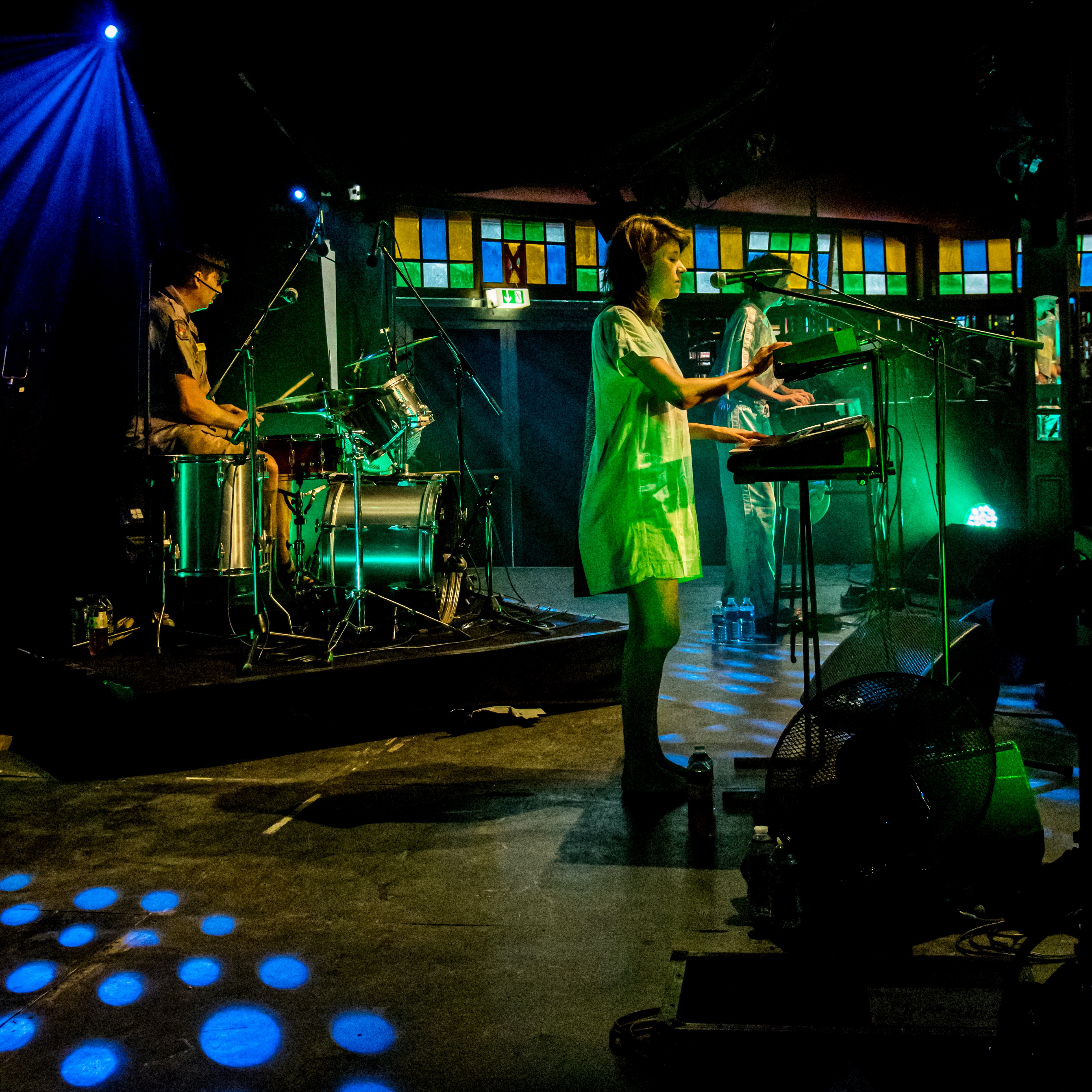 Bilder vom Zelt Musik Festival 2018 in Freiburg im Breisgau Schnipo Schranke am 27.07.2018 im Spiegelzelt